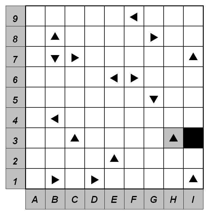 grille de crops - niveau de difficulté important. La grille donne les zones de couleurs des pions (40 rouges 40 verts et un noir).